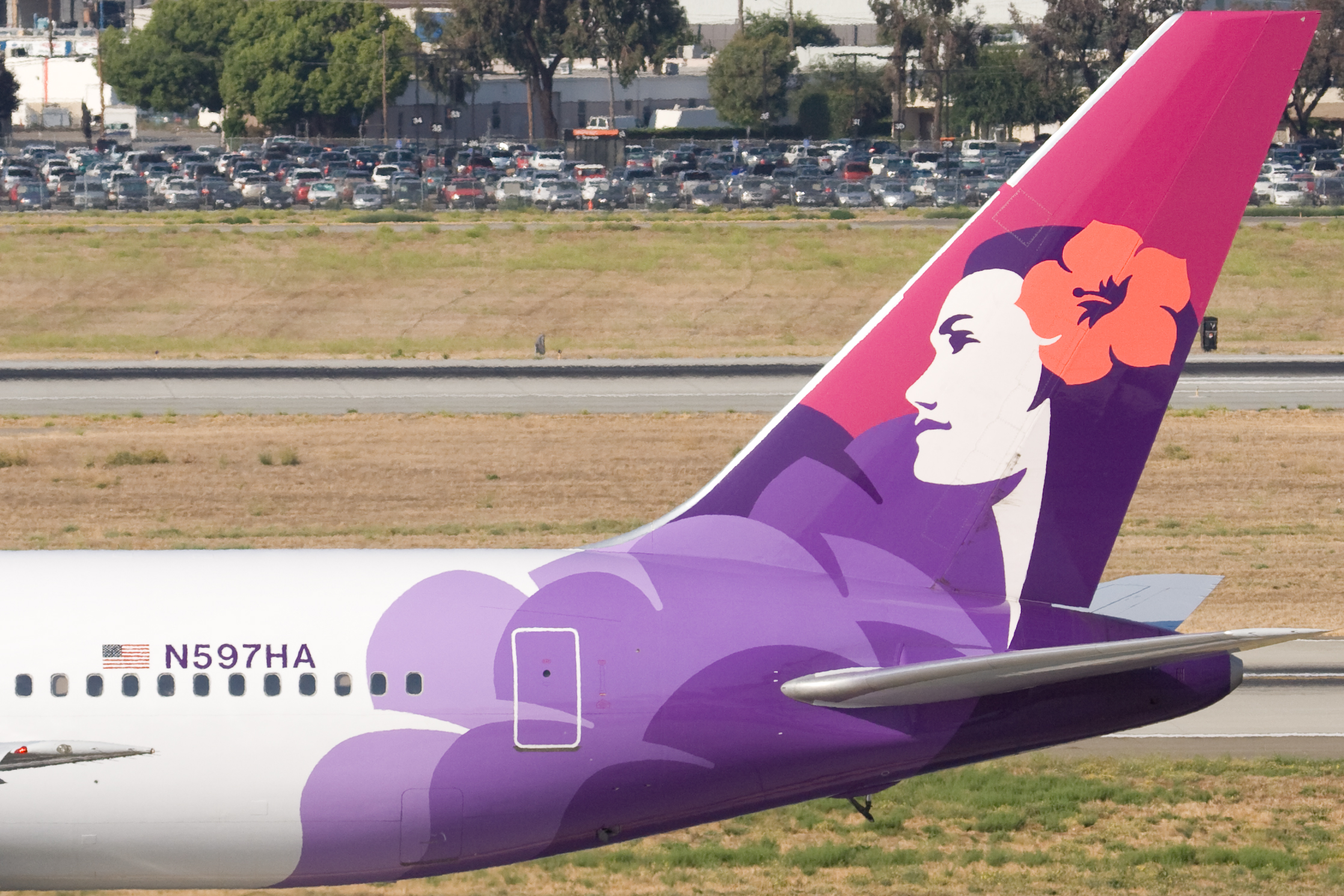 Hawaiian Tail